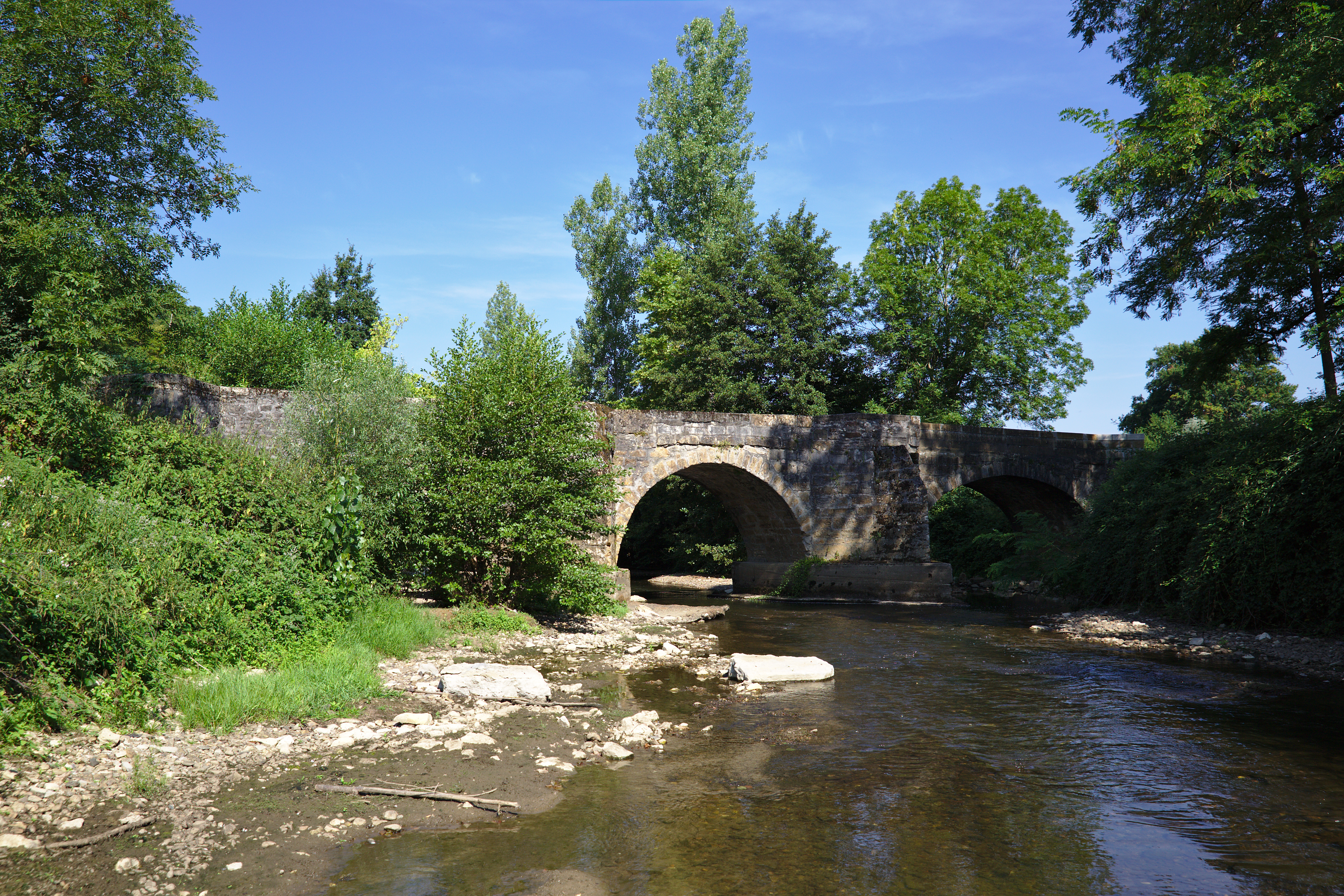 Pont de Maday sur la Bave, entre les communes de Loubressac et Prudhomat, Lot, France. .